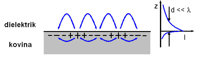 Nastanek površinskega plazmona.